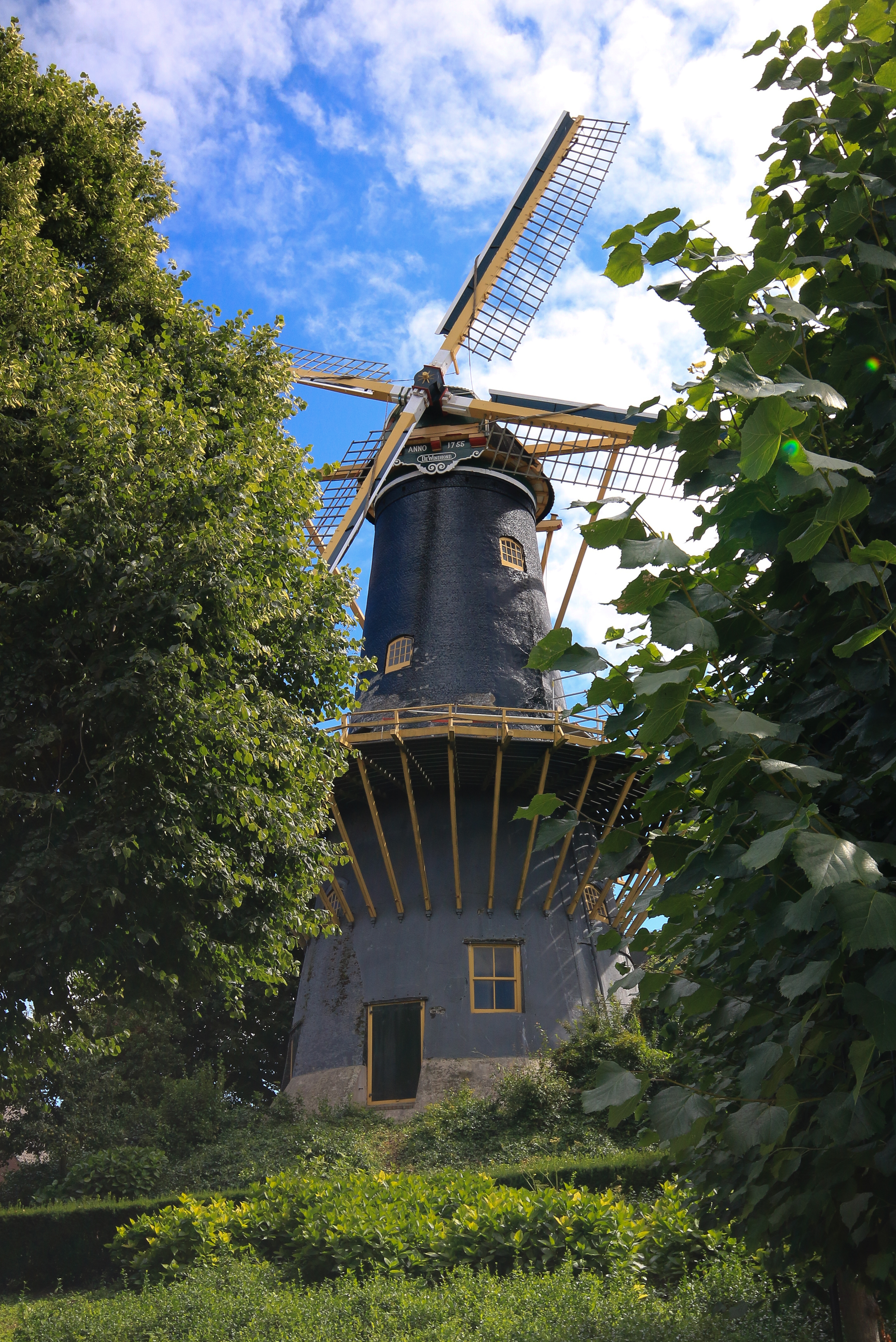 De Windhond, een graanmolen in Woerden die nog wekelijks in gebruik is.